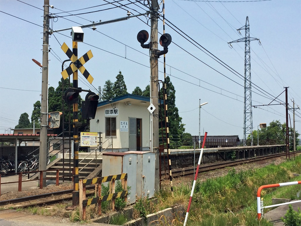 富山地方鉄道 田添駅全景